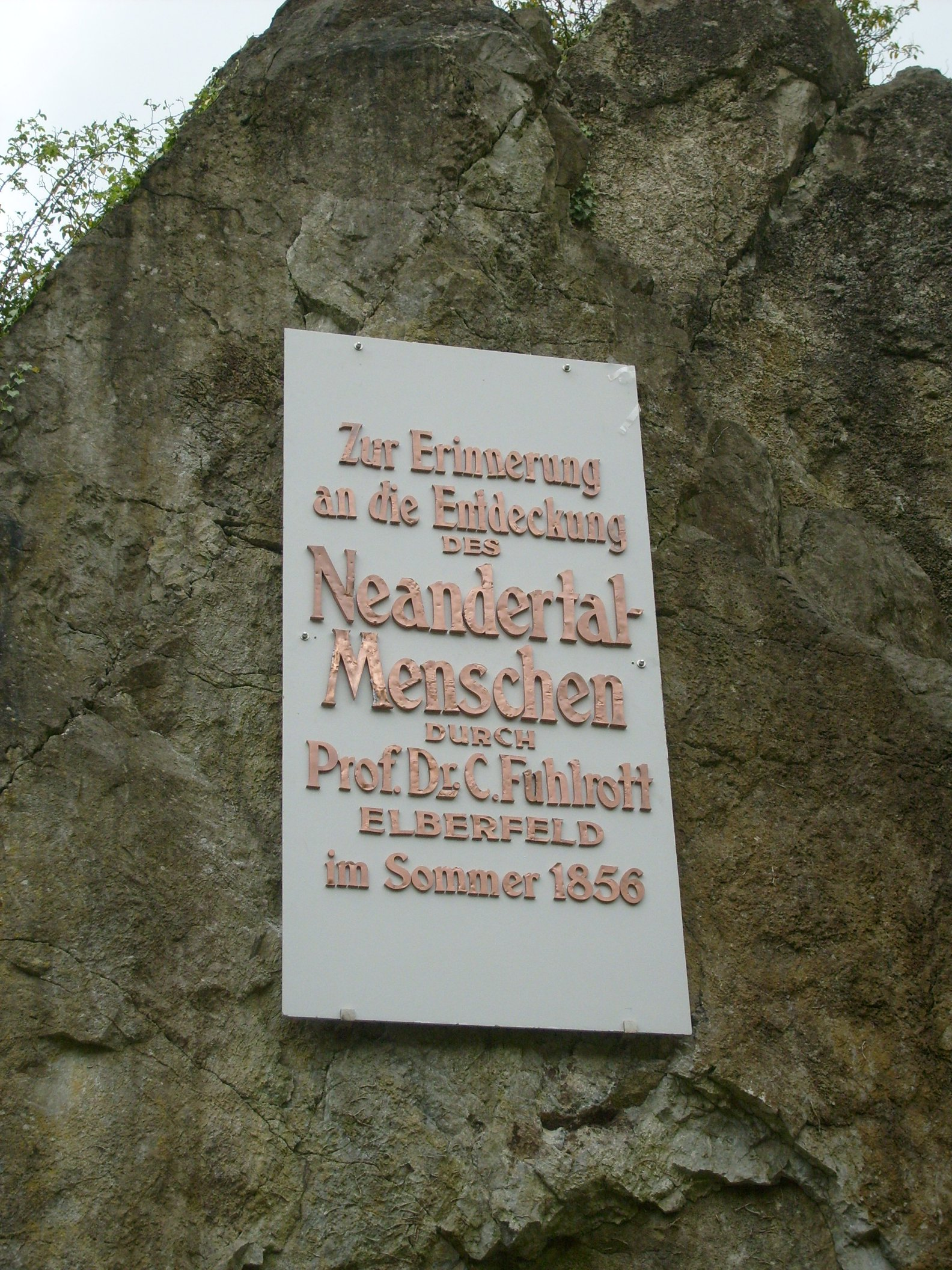 Erinnerungstafel zum Fund des Neandertalers und dessen Klassifizierung durch Johann Carl Fuhlrott im Jahre 1856 am Felsen „Rabenstein“. Die Tafel wurde 1926 angebracht und im April 2009 gesäubert und restauriert.